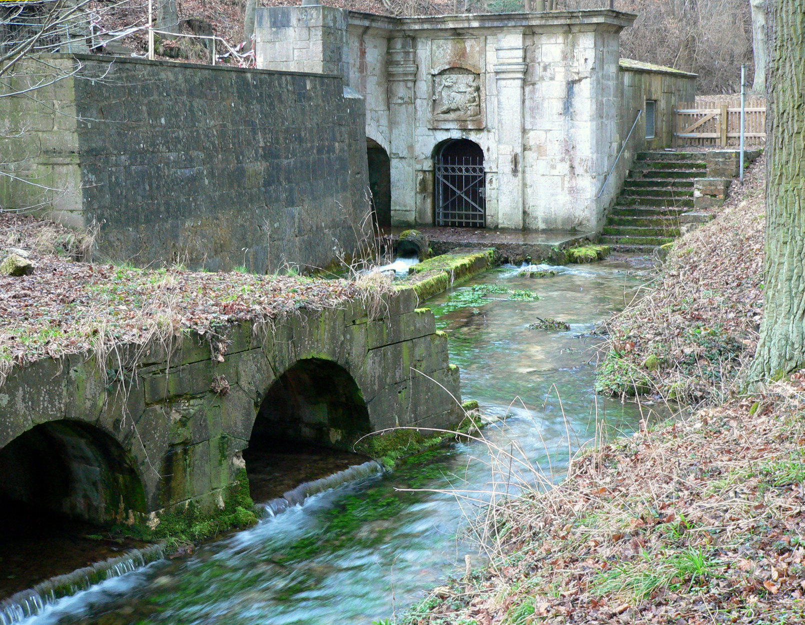 Lutter-Quelle an Lutterspring bei Königslutter